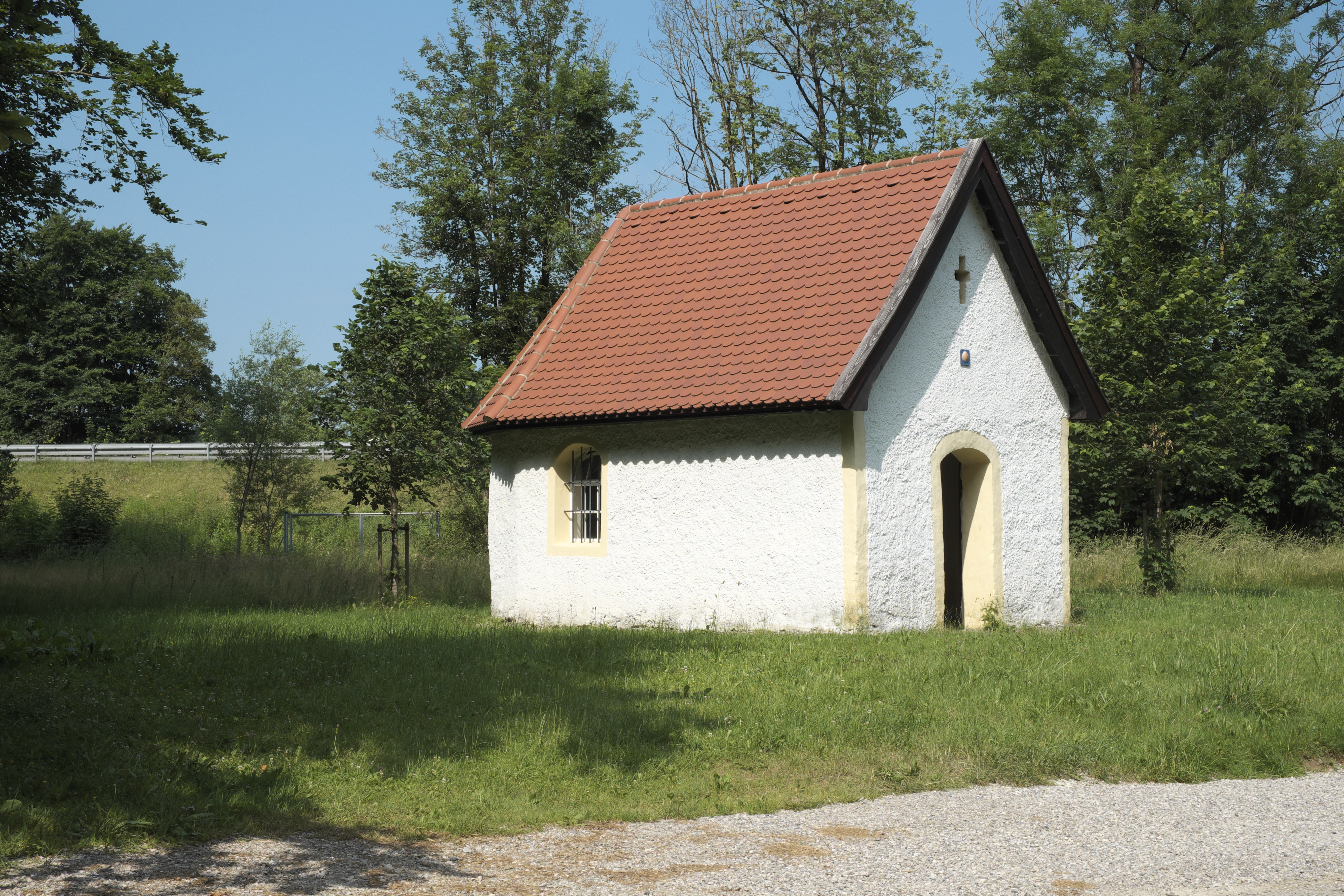 Waldkapelle in Neufahrn (Schäftlarn) im Landkreis München (Bayern, Deutschland)